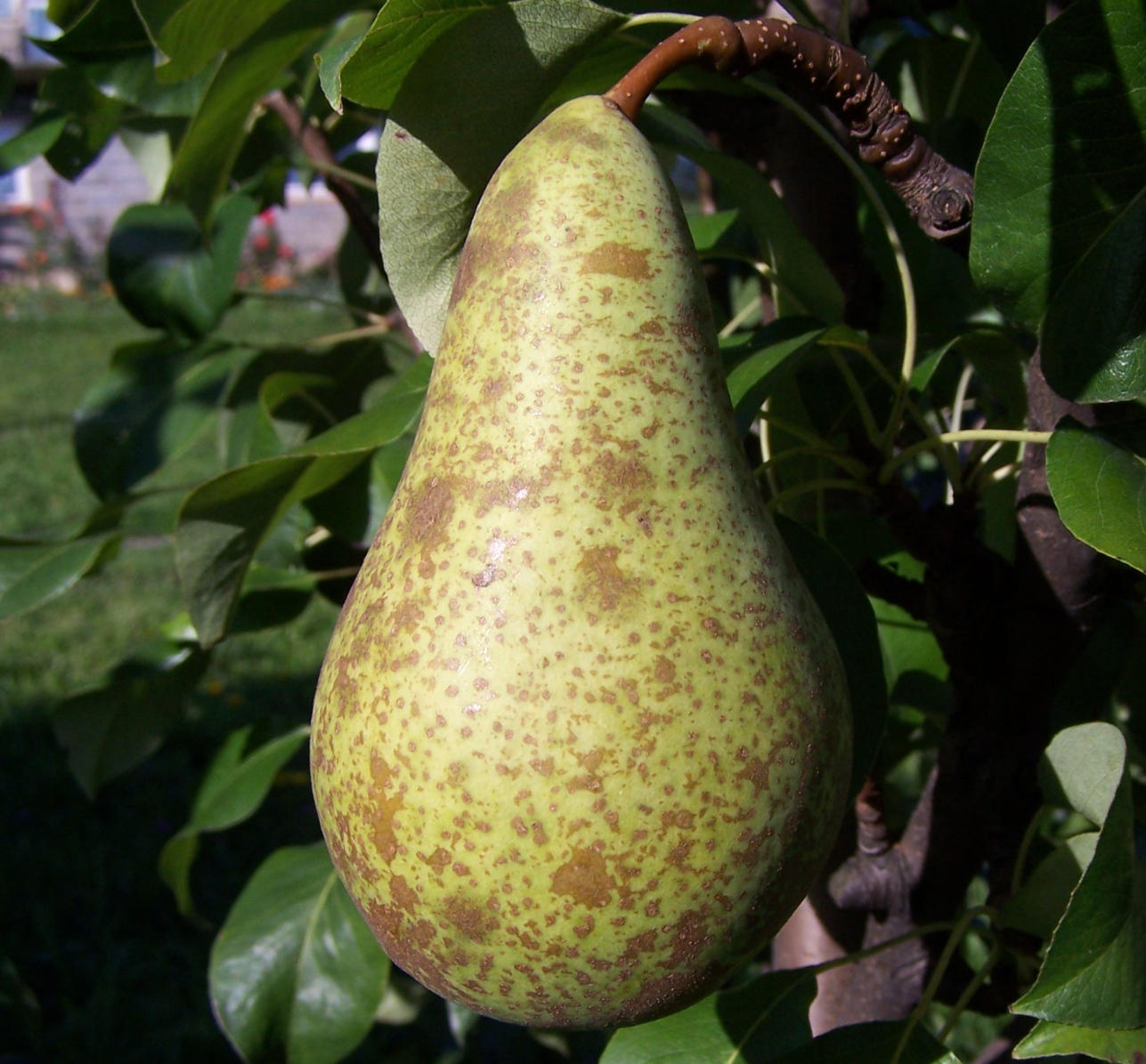 Pyrus communis 'Bera'